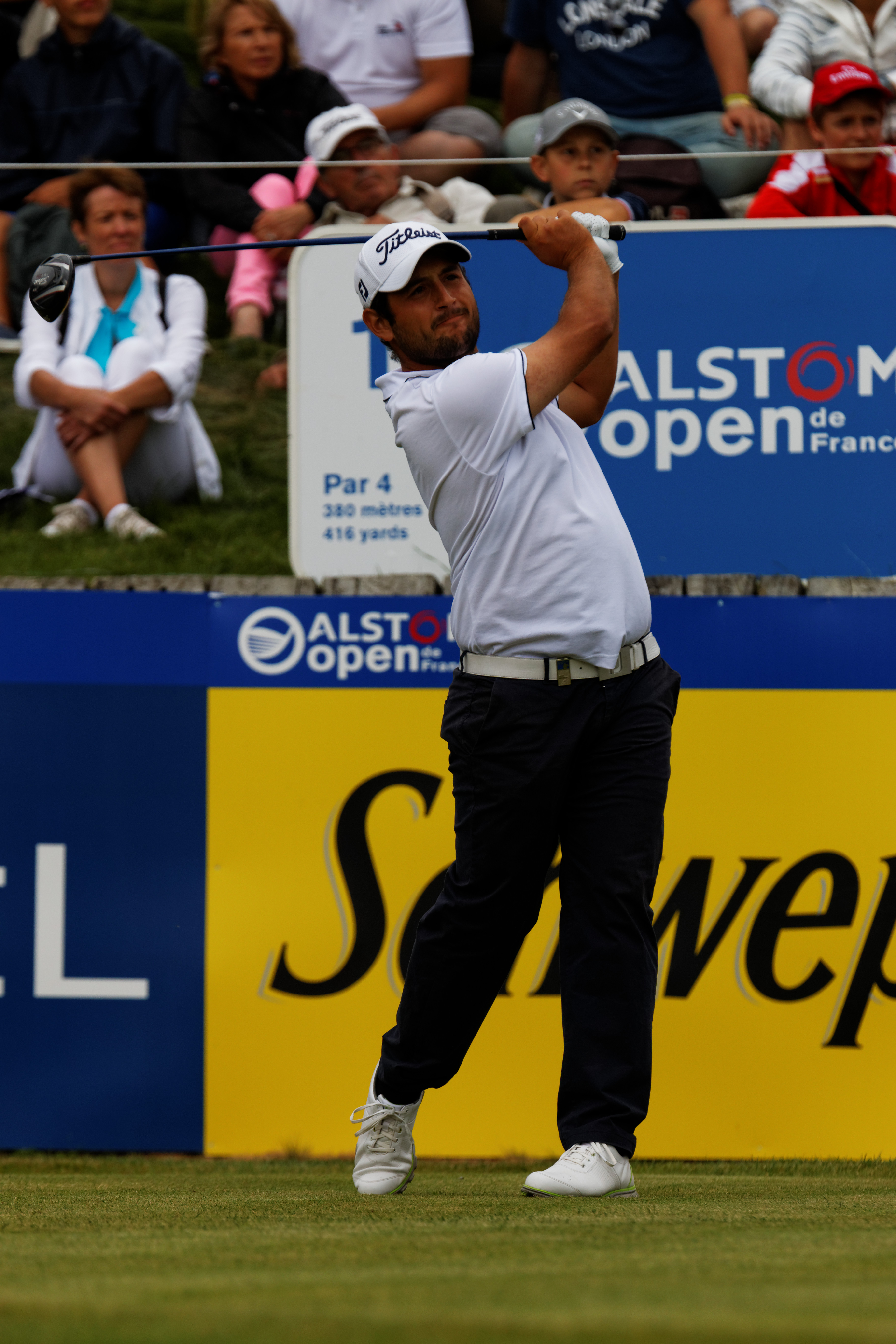 Alexander Levy lors du second tour de l'Open de France 2014 - Golf National - Saint-Quentin-en-Yvelines (78) - départ du trou n° 1